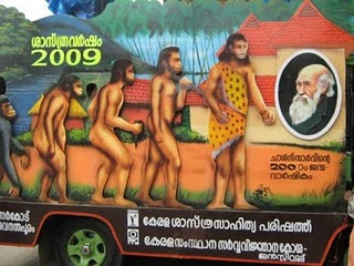 കേരളാ ശാസ്ത്രസാഹിത്യ പരിഷത്ത് സംഘടിപ്പിച്ച ശാസ്ത്ര വണ്ടിയുടെ മലപ്പുറം സ്വീകരണ കേന്ദ്രത്തിൽ നിന്നും എടുത്ത ചിത്രം -റഫീക്ക് കിഴാറ്റൂർ